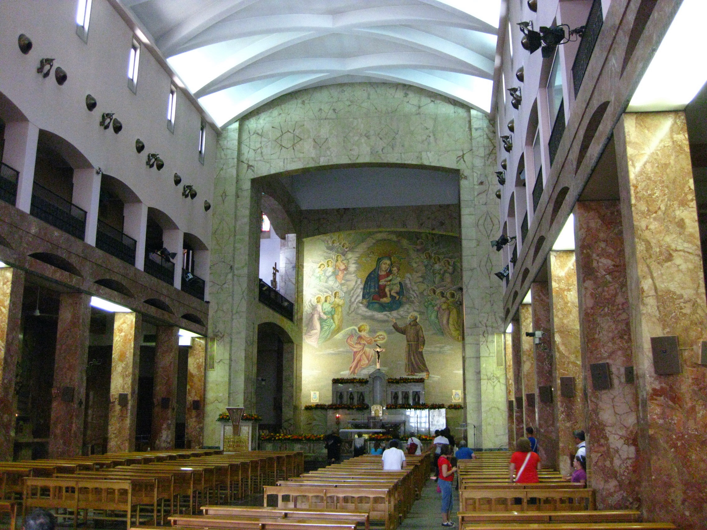 La costruzione della chiesa di Santa Maria delle Grazie e del convento di Padre Pio di San Giovanni Rotondo iniziò nel 1538 per opera del popolo di San Giovanni Rotondo (provincia di Foggia) con l'approvazione del Vescovo di Siponto il Cardinal Giovanni Maria di Monte San Savino (Papa Giulio III). Il 1º febbraio del 1557 ospitò San Camillo de Lellis. L'arrivo al convento di San Giovanni Rotondo di Padre Pio da Pietrelcina è datato 28 luglio 1916. La Chiesa Antica di Santa Maria delle Grazie: Nel 1540 iniziarono i lavori per la sua costruzione che terminarono il 5 luglio 1676. La Chiesa Grande di Santa Maria delle Grazie: Su progetto dell'architetto Giuseppe Gentile di Boiano (CB), i lavori per la costruzione della chiesa iniziarono il 2 luglio del 1956. La consacrazione si ebbe il 1º luglio del 1959 (lo stesso giorno dell'inaugurazione - nel 2004 - della nuova chiesa di Padre Pio da Pietrelcina progettata dall'architetto Renzo Piano). Il giorno successivo, 2 luglio 1959, il Cardinale Federico Tedeschini incoronò il mosaico della vergine col titolo di "Madonna delle Grazie".